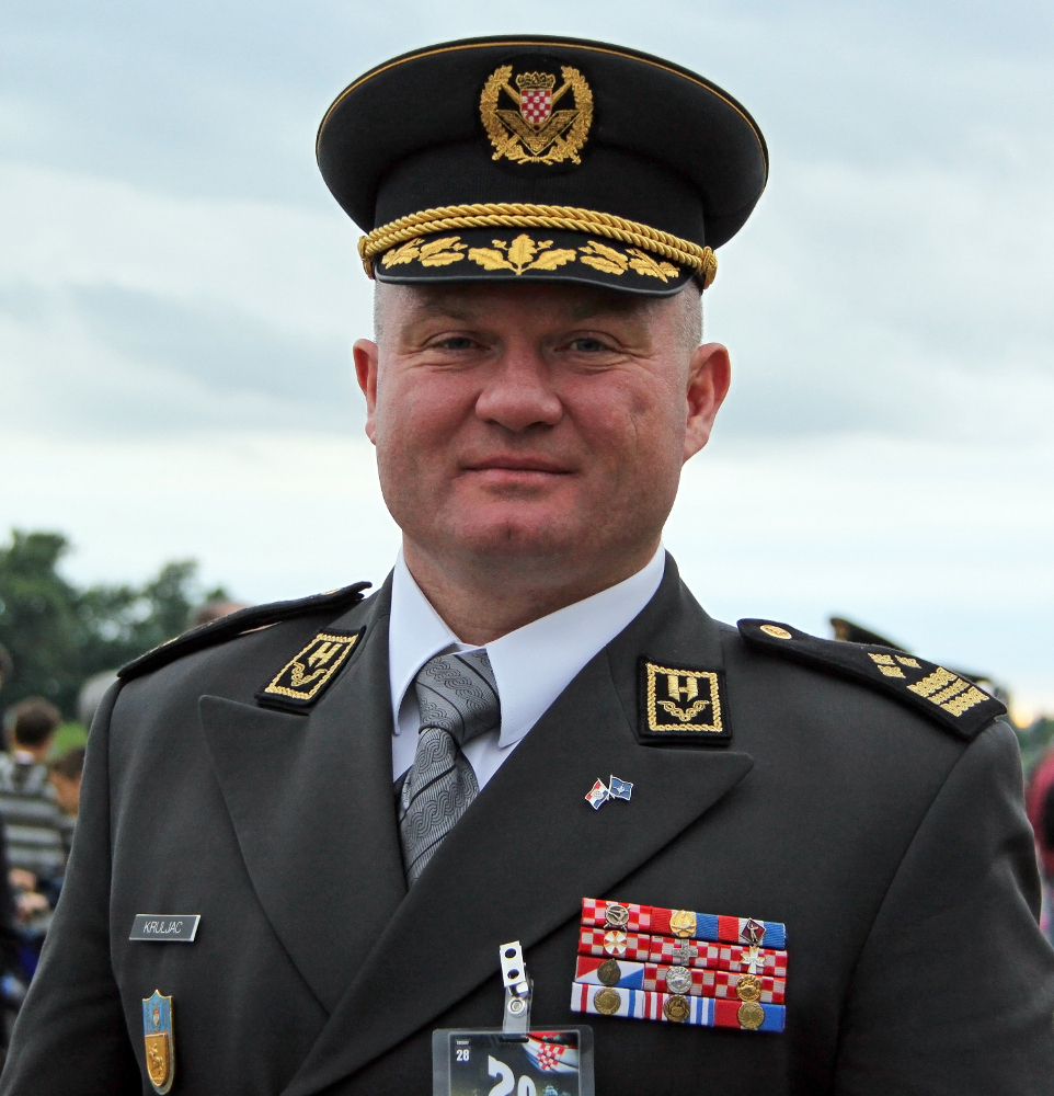 general pukovnik Mladen Kruljac na proslavi dvadesete godišnjice formiranja Oružanih snaga Republike Hrvatske.